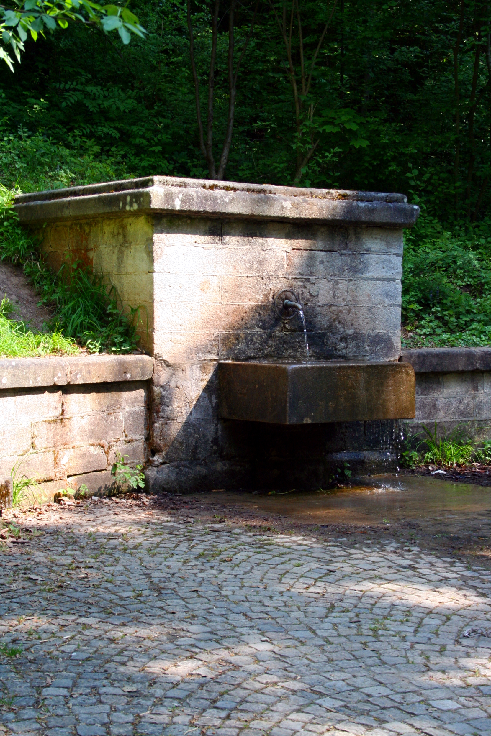 Sophienbrunnen in Stuttgart-West, Baden-Württemberg